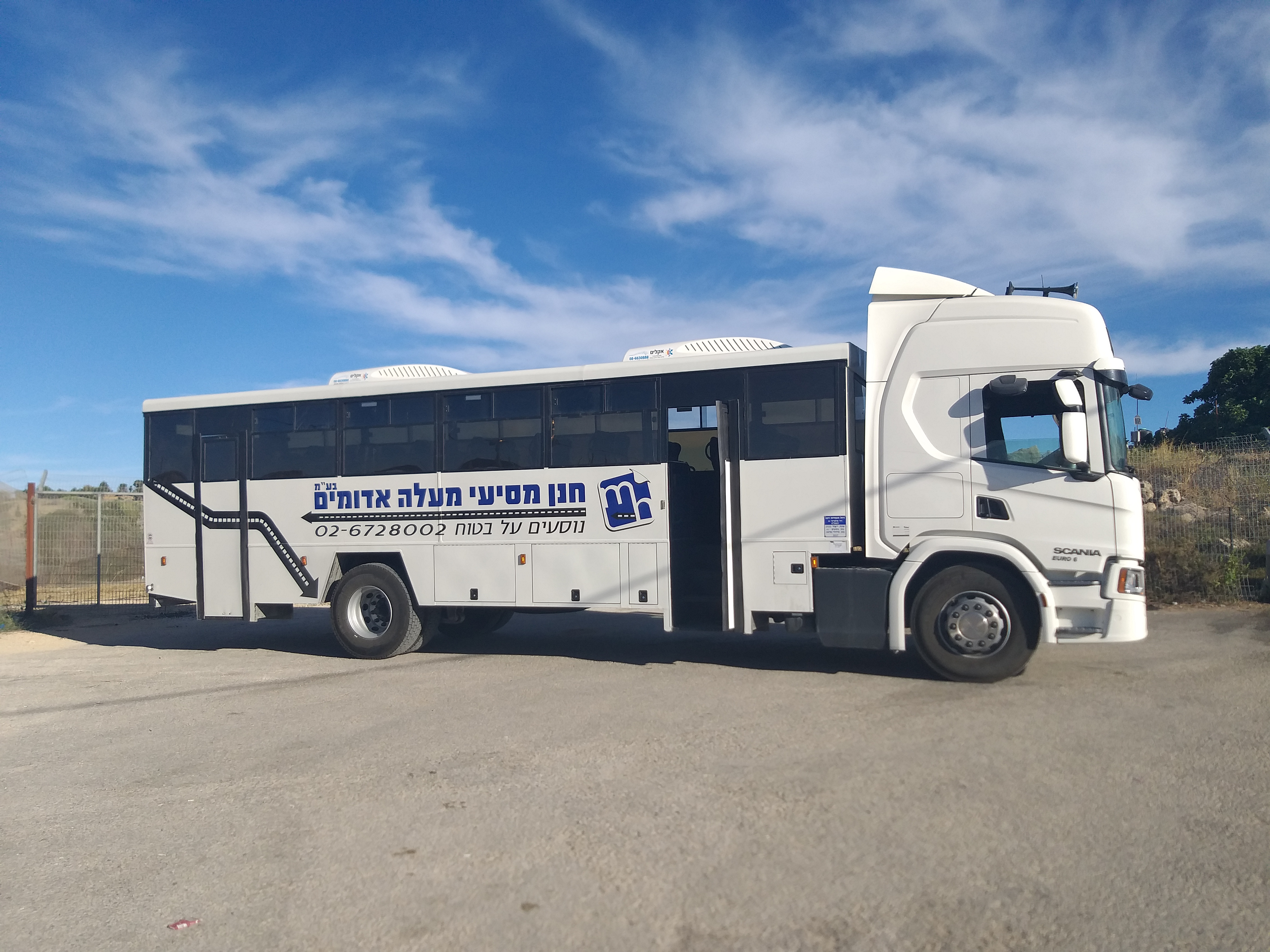 טיולית סקניה 2020